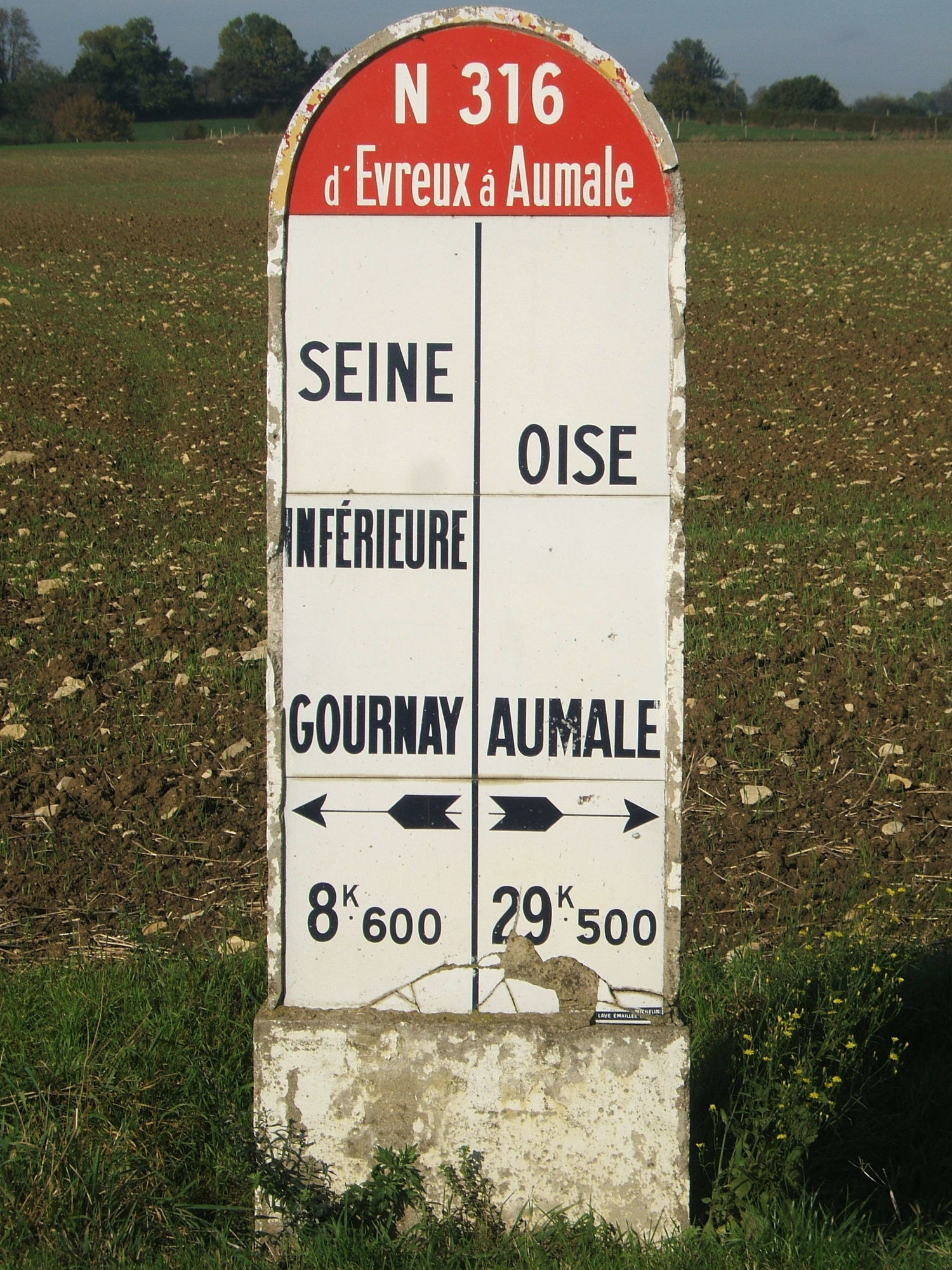 Borne interdépartementale sur la RN 316 entre la Seine-Inférieure et l'Oise / Milestone on the RN 316 between the Seine-Inférieure and the Oise départements